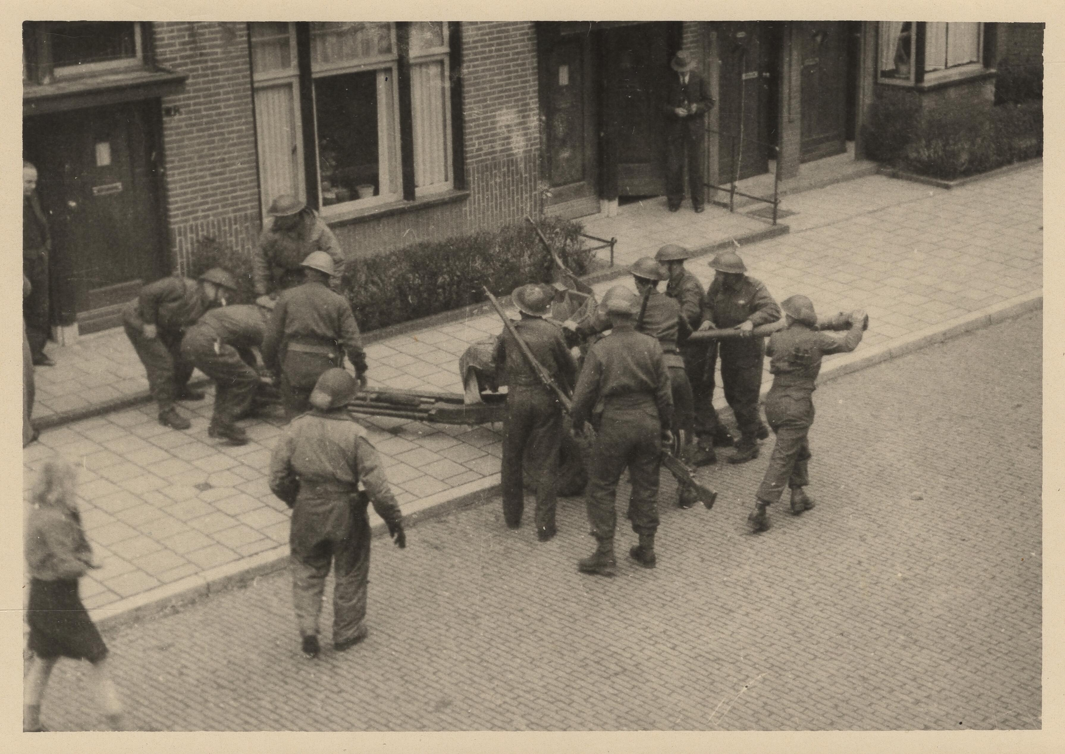 Canadezen stellen geschut op aan de Ernst Casimirlaan tijdens de Bevrijding van Groningen